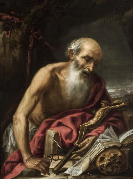 La obra representa a San Jerónimo de Estridón, uno de los Padres de la Iglesia, en actitud penitente y contemplativa.